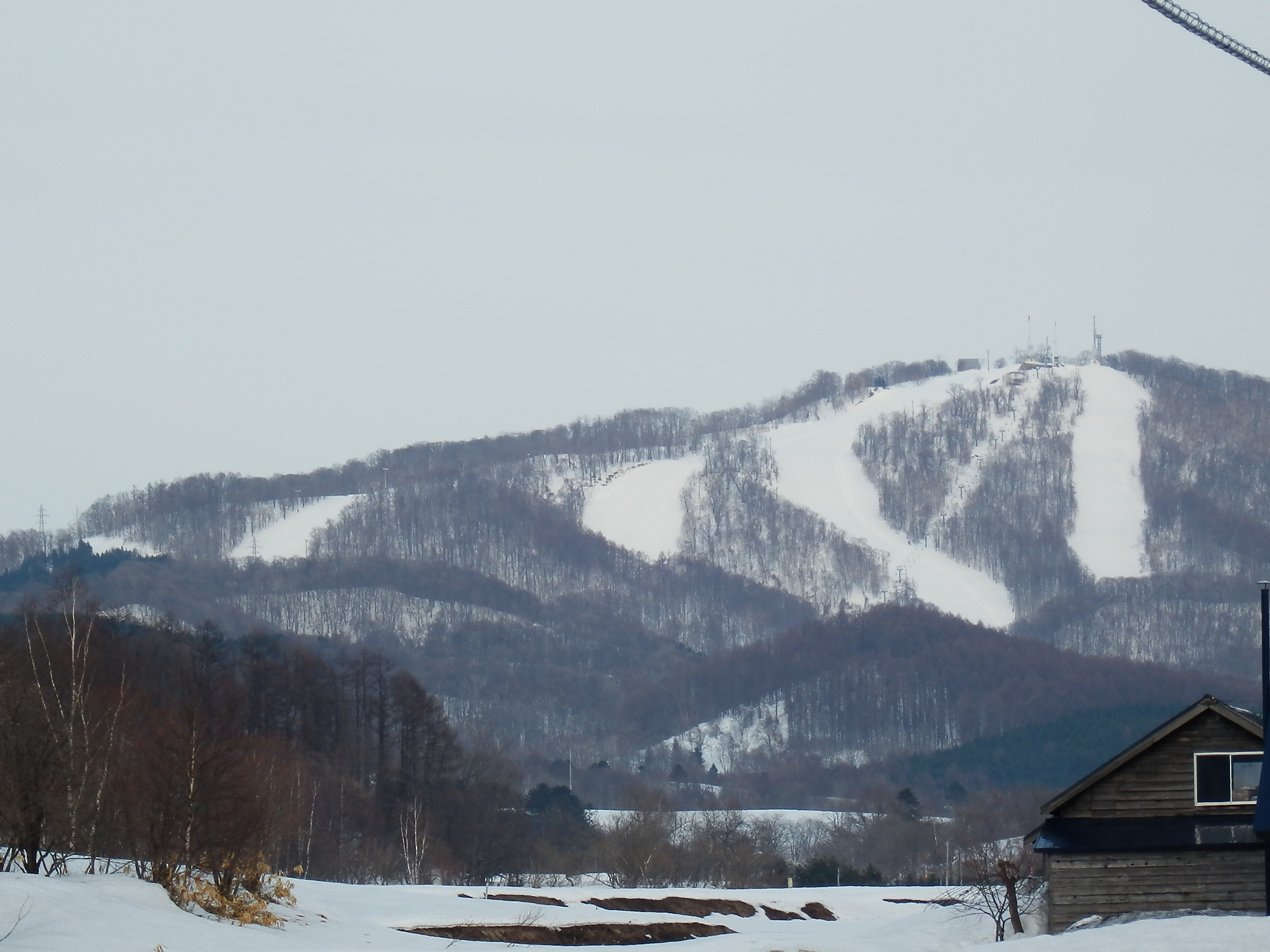 かもい岳国際スキー場ウエストゲレンデ全景